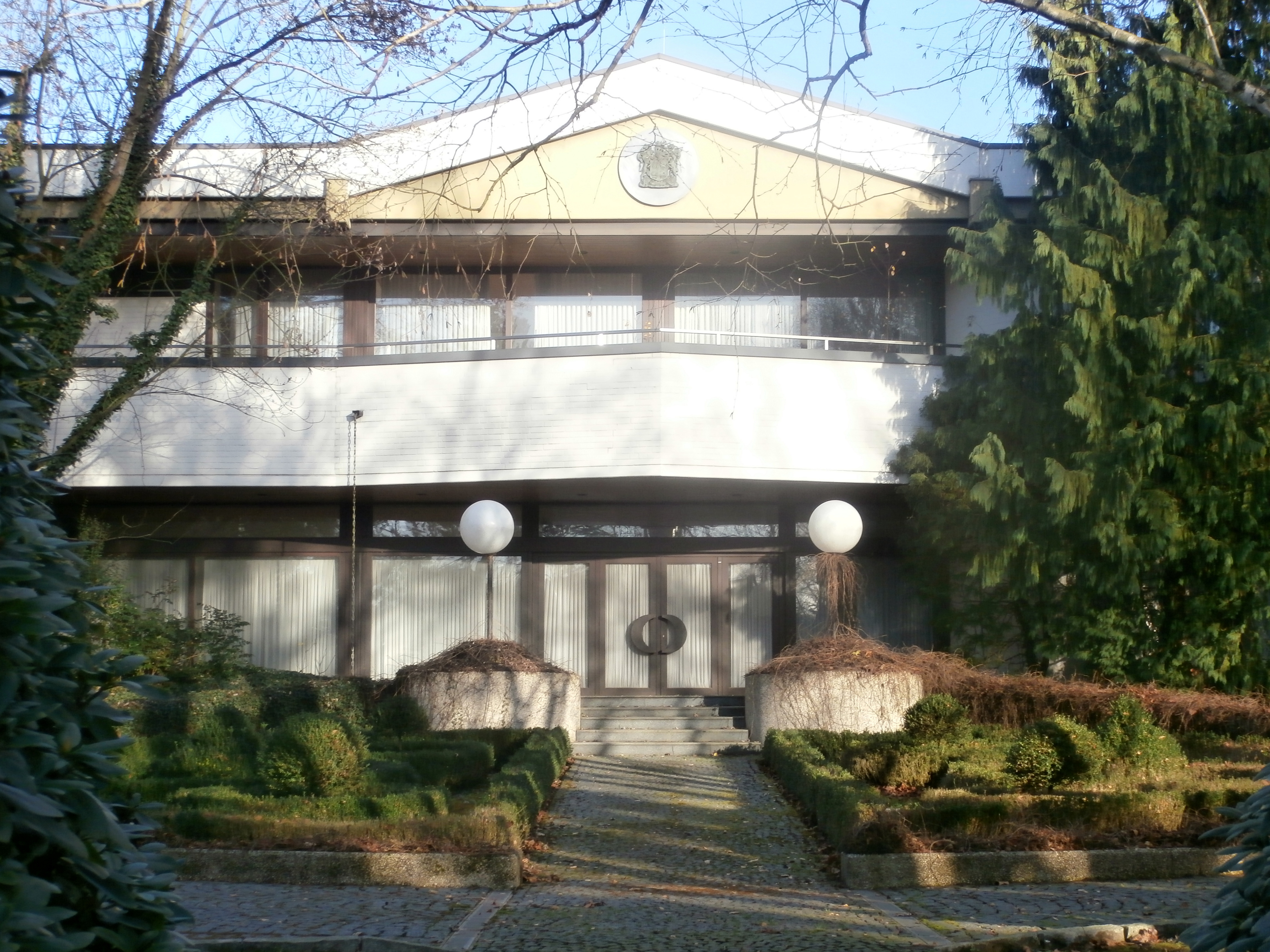 Ehemalige Residenz der Botschaft von Südafrika, Rüdigerstraße 20, Mehlem, Bad Godesberg, Stadt Bonn